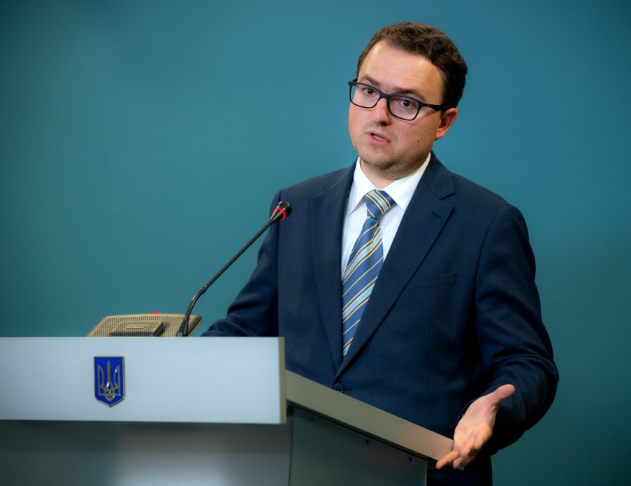 Кориневич Антон Олександрович